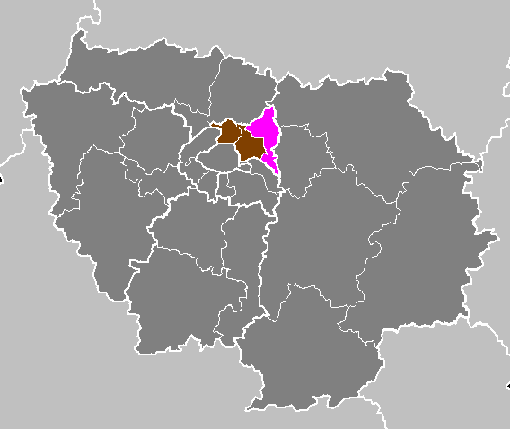 Maps of arrondissements and cantons of France: Département de la Seine-Saint-Denis - Arrondissement du Raincy.PNG (Région Île-de-France)